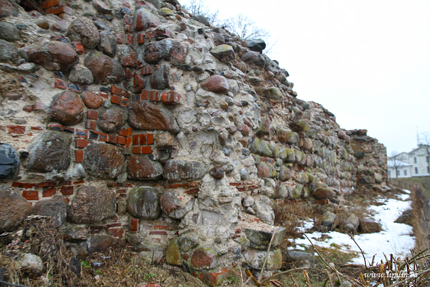 Гродна. Рэшткі сцен Старога замка